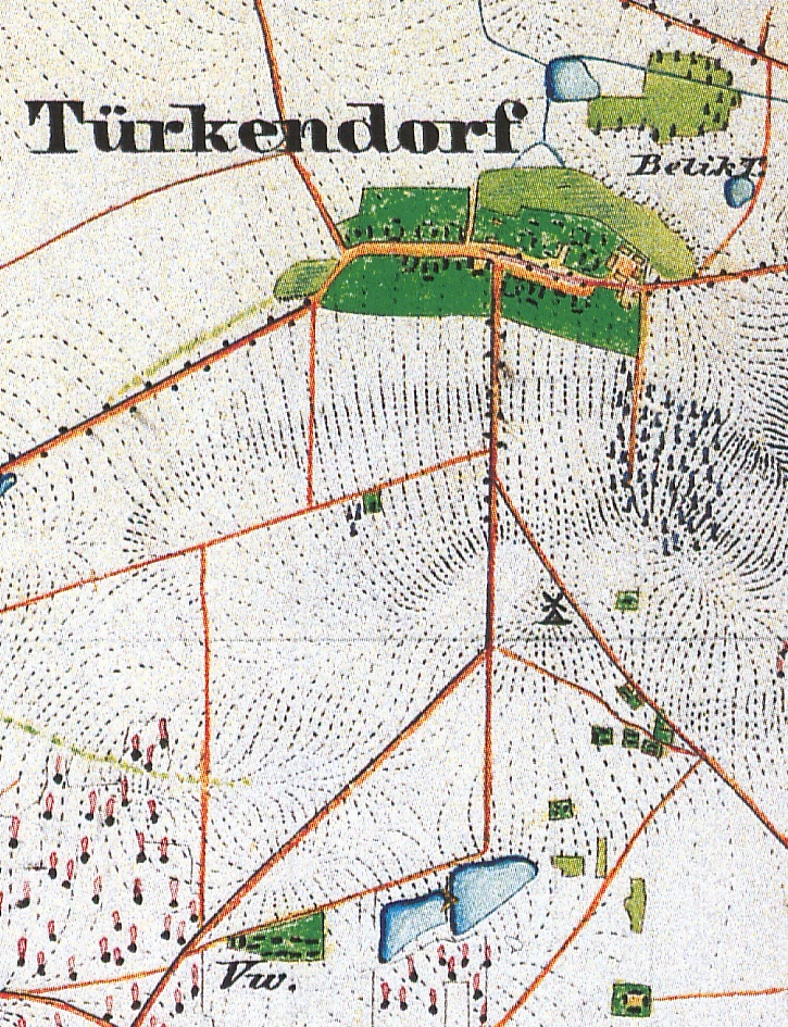 Türkendorf, Ortsteil der Stadt Spremberg, Landkreis Spree-Neiße, Brandenburg, Ausschnitt aus dem Urmessischblatt 4452 Spremberg von 1846